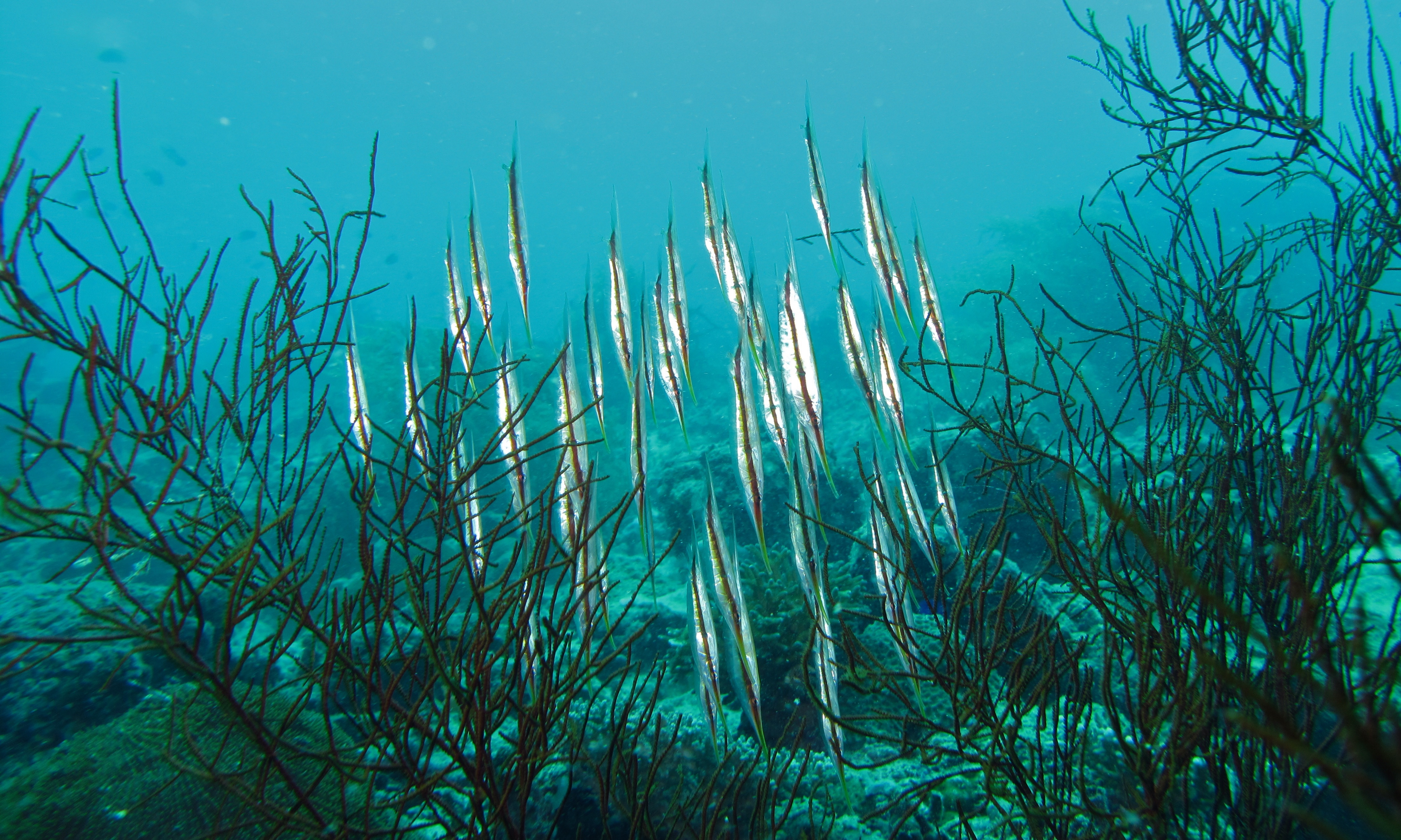 Mandarine Bay, Pulau Sibuan, Sabah, MALAYSIA